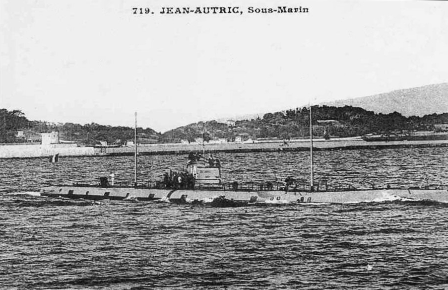 Sous-marin allemand UA 105, type U93, rebaptisé Jean-Autric en 1918